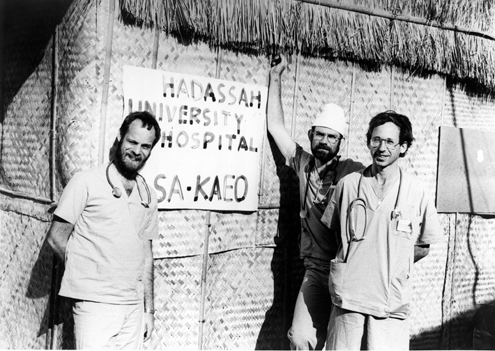 משלחת הסיוע הישראלית הראשונה לסיוע לפליטי קמבודיה במחנה הפליטים ב-סא קאאו בתאילנד 1979